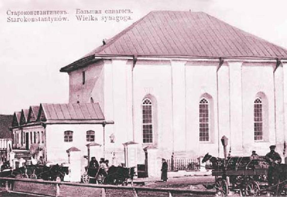 Велика Старокостянтинівська синагога